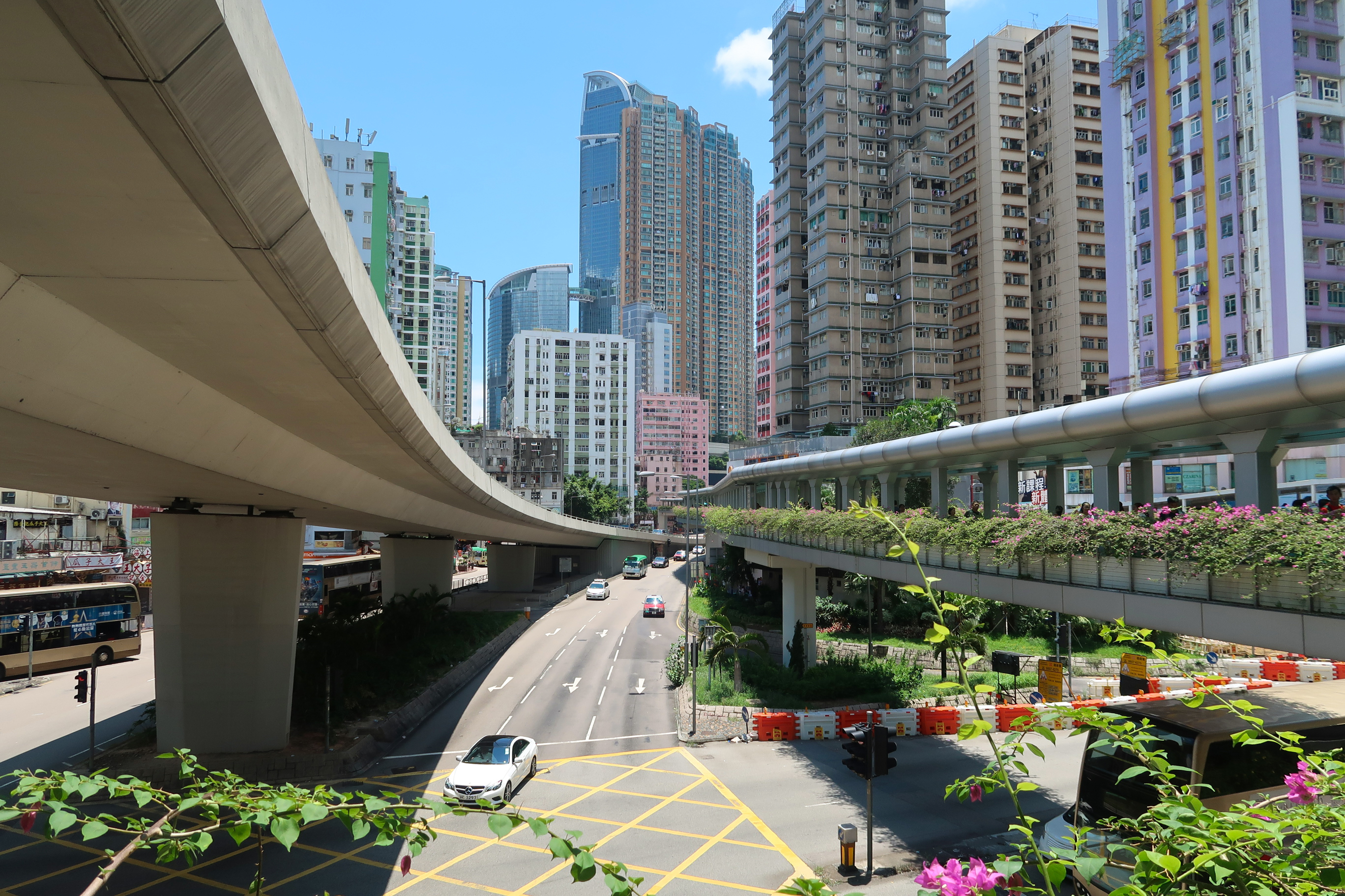 Tai Ho Road